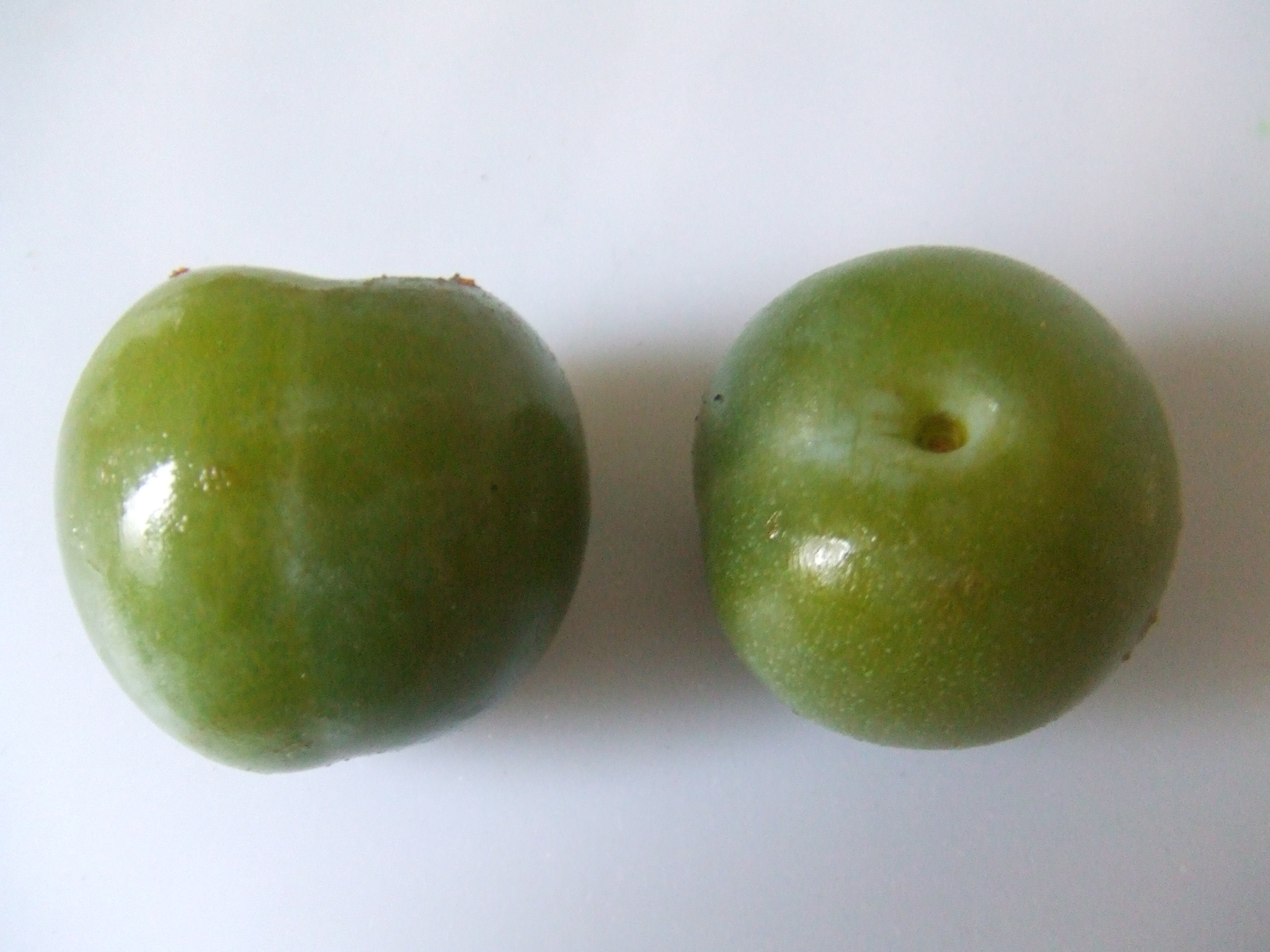 Reine Claude Verte, gekocht op de Binnenrotte markt in Rotterdam